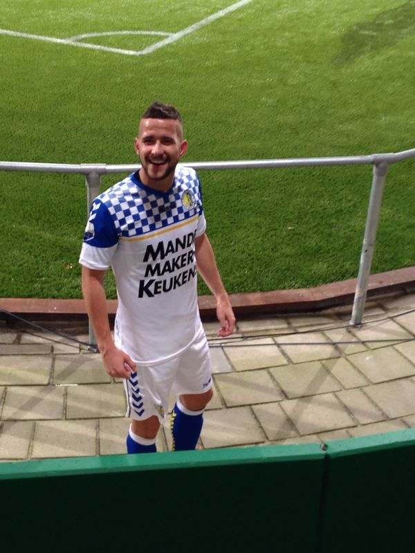 ADO Den Haag - RKC Waalwijk 1-2. 2 goals scored by Kenny Anderson